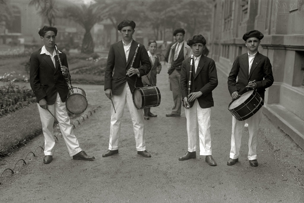 Título original: Grupo de txistularis en San Sebastián (2/6) Localización: San Sebastián (Guipúzcoa)